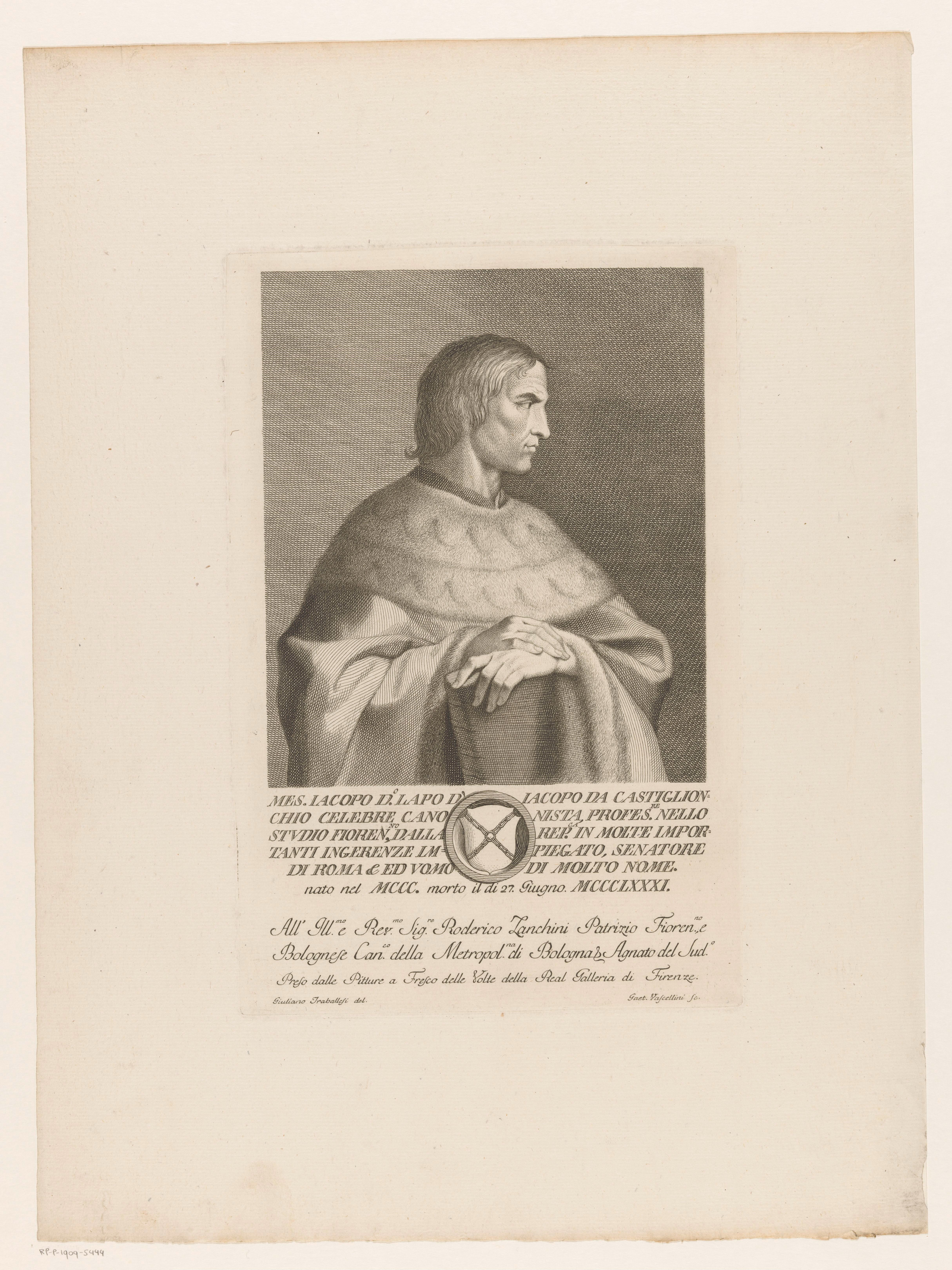 IdentificatieTitel(s): Portret van schrijver Lapo da CastiglionchioObjecttype: prent Objectnummer: RP-P-1909-5444Opschriften / Merken: verzamelaarsmerk, verso, gestempeld: Lugt 2228Omschrijving: Onder het portret een tekst in het Italiaans en een wapenschild in een cirkelvormig kader.VervaardigingVervaardiger: prentmaker: Gaetano Vascellini (vermeld op object)naar tekening van: Giuliano Traballesi (vermeld op object)naar schildering van: onbekend (vermeld op object)opgedragen aan: Roderico Zanchini (vermeld op object)Plaats vervaardiging: ItaliëDatering: 1755 - 1805Fysieke kenmerken: ets en gravureMateriaal: papier Techniek: graveren (drukprocedé) / etsenAfmetingen: plaatrand: h 307 mm × b 203 mmOnderwerpWat: historical personsWie: Lapo da CastiglionchioVerwerving en rechtenVerwerving: aankoop 1905Copyright: Publiek domein